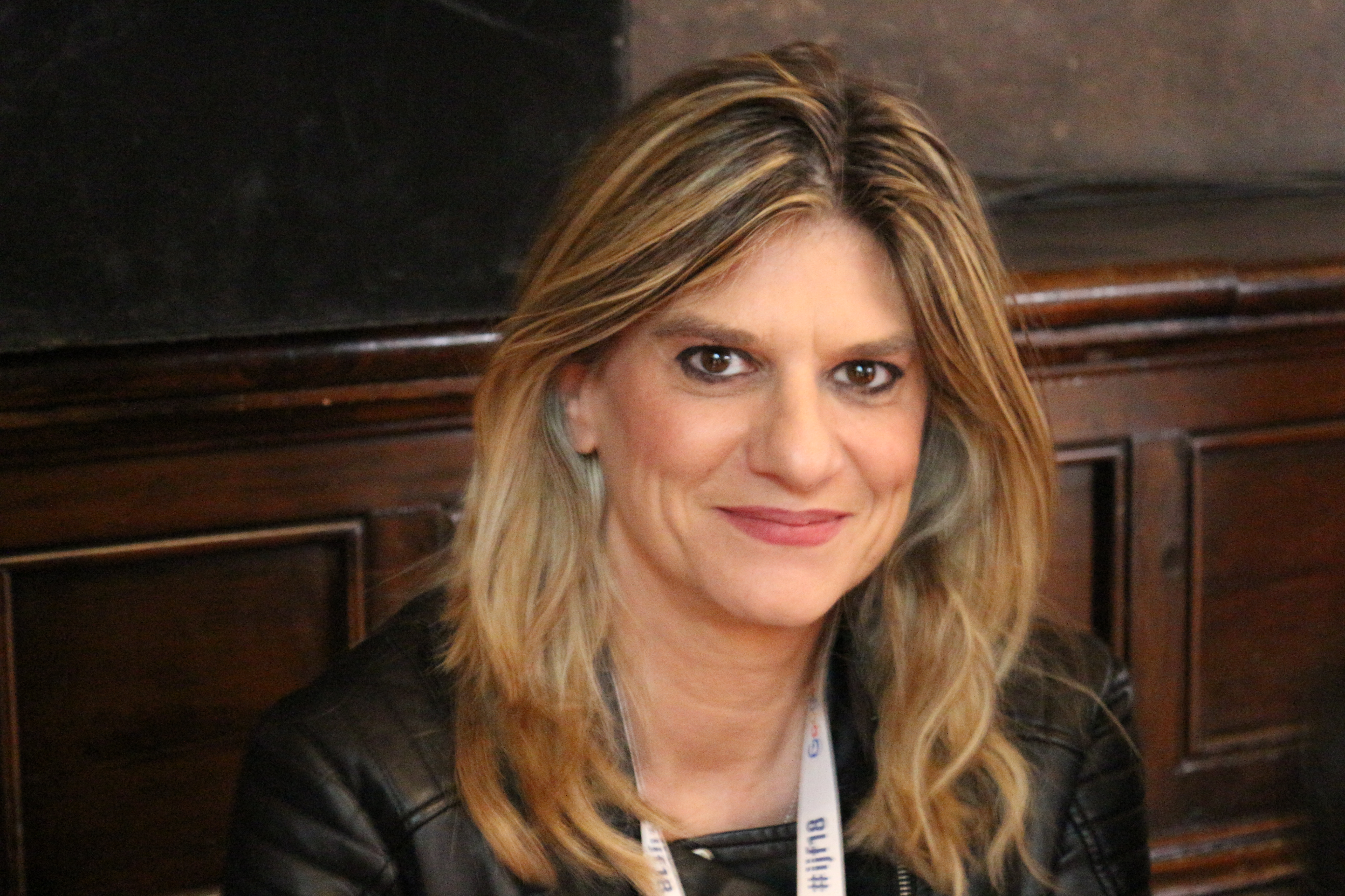 Federica Angeli, giornalista italiana. Fotografata al Festival del giornalismo nel 2018